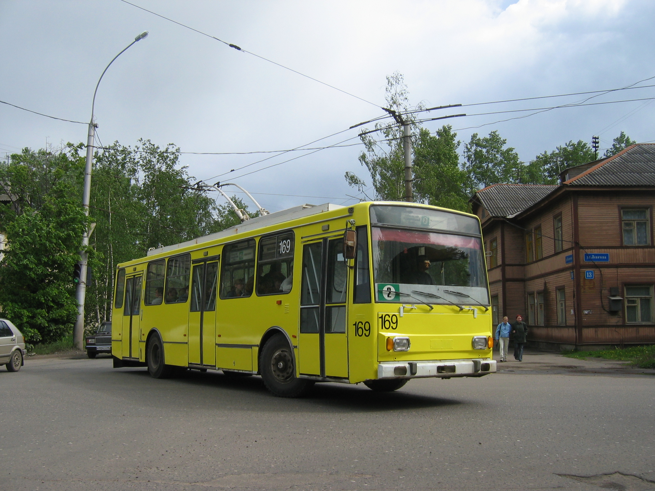 Троллейбус Шкода поворачивает на ул. Левичева